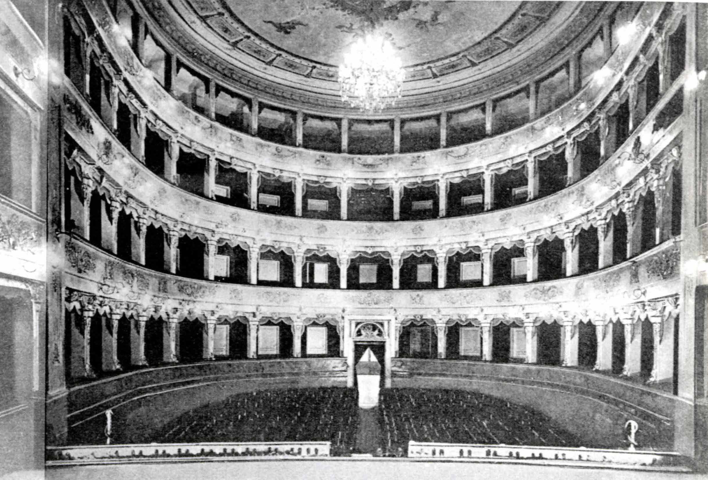 autore sconosciuto, riproduzione da foto originale di primo 900, Interno dell'oggi demolito Teatro comunle di Teramo, opera il cui autore è morto da più di 70 anni, , acquisita da scanner Licensing Categoria:Immagini di Teramo